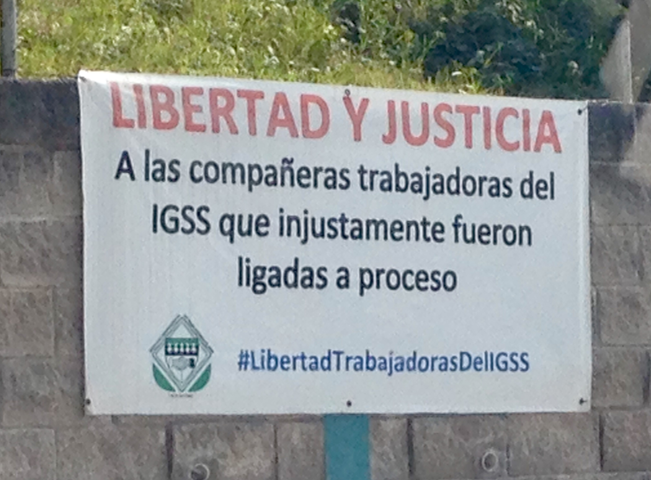 Pancarta en uno de los hospitales del IGSS en la Ciudad de Guatemala, a favor de las enfermeras ligadas a proceso por pertenecer a la comisión de postulación de la empresa Pisa en 2015.